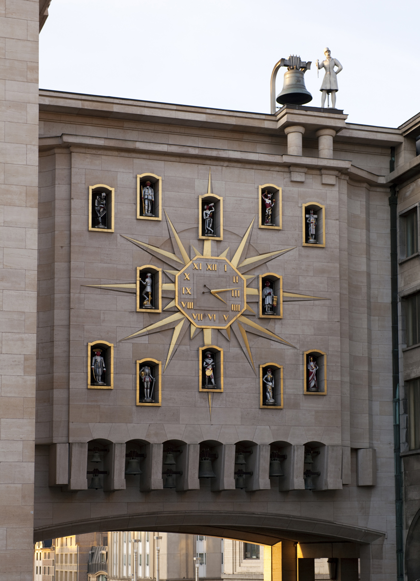 Le carillon du Mont des Arts / De sprekende klok 1958